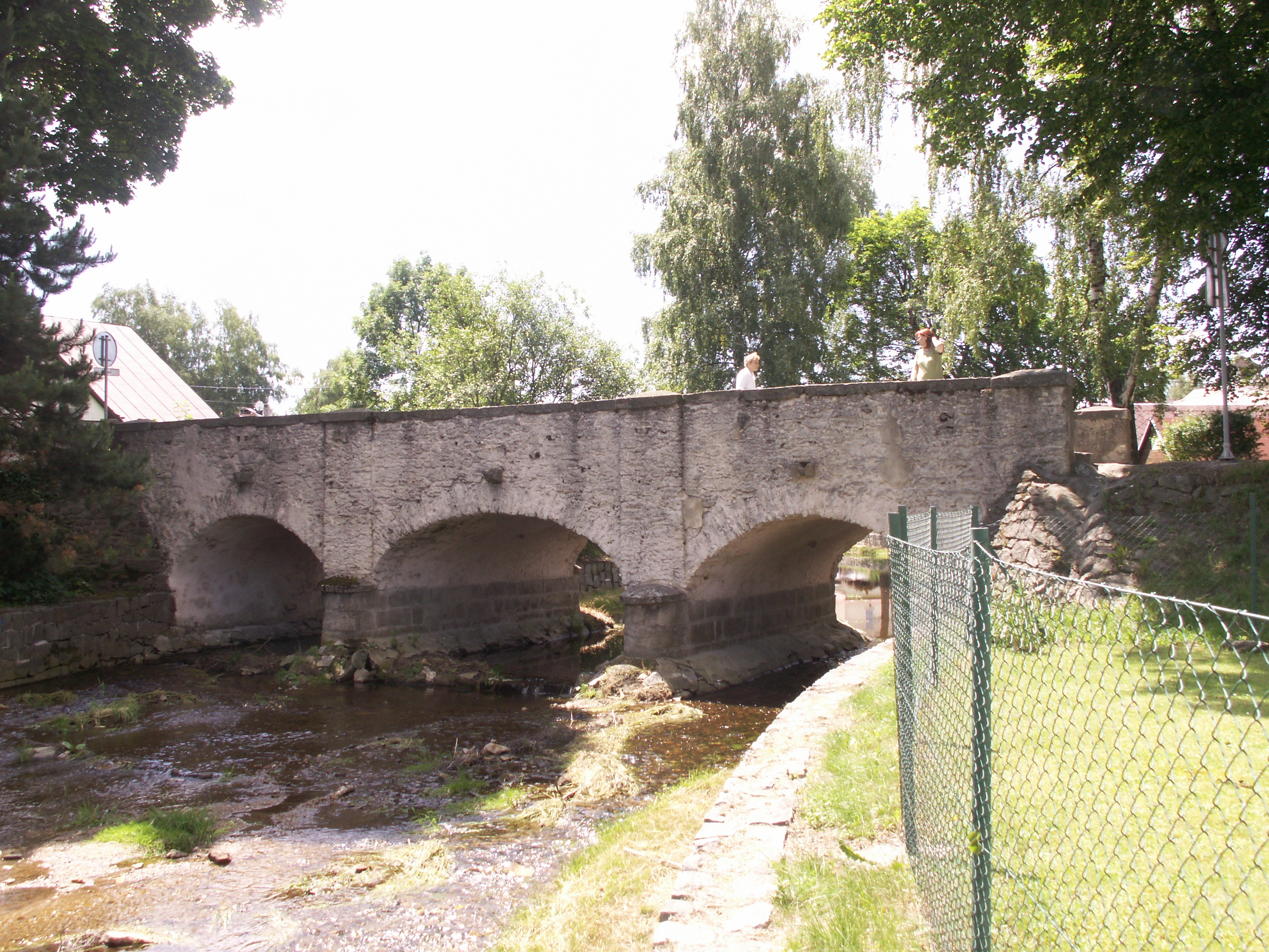 Herálec (okres Žďár nad Sázavou) - most přes řeku Svratku